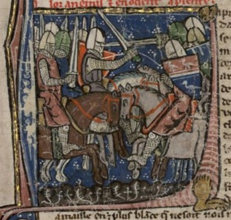 Bataille de Jérusalem (1099)